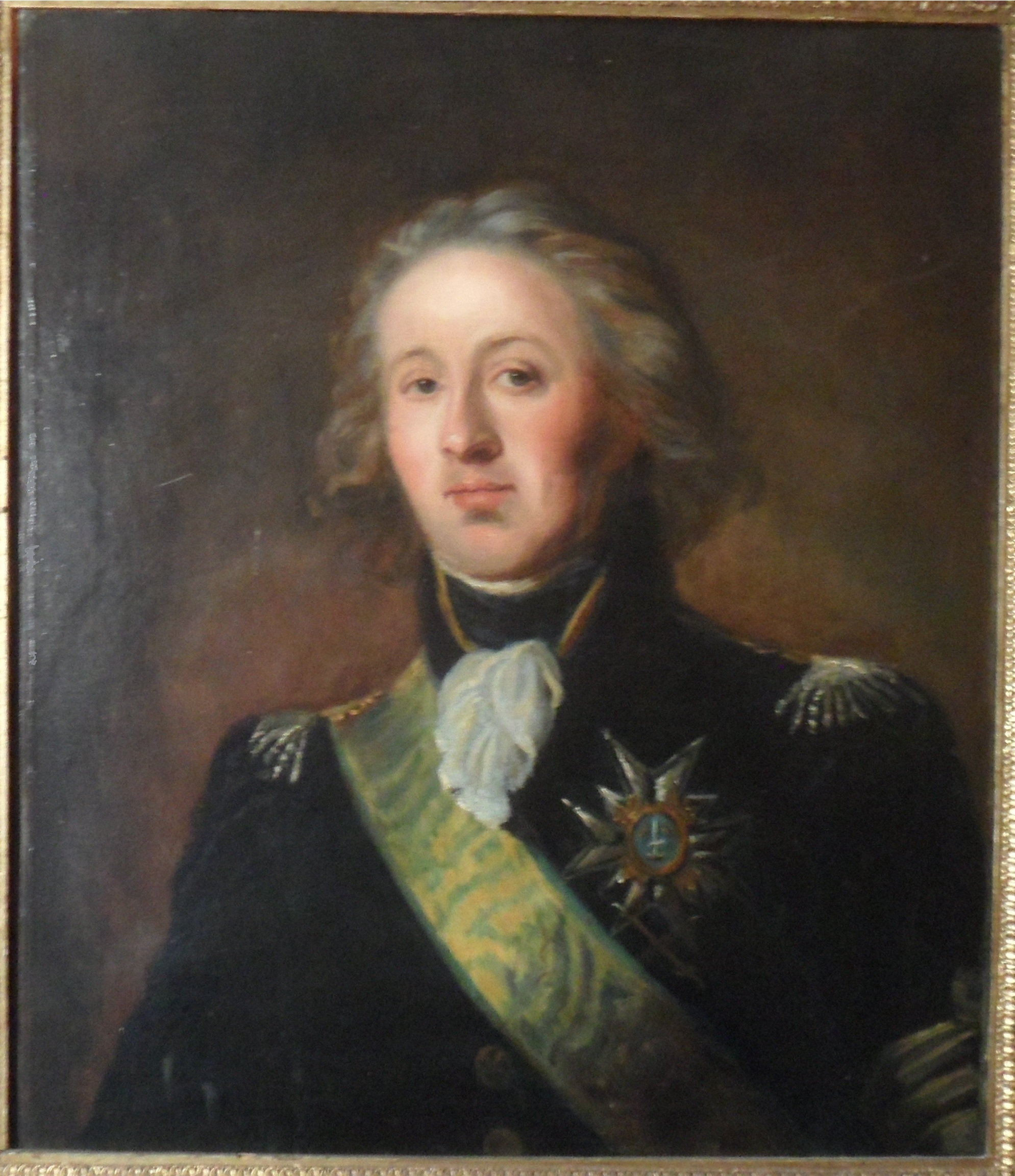 Portrait of Gustav Wachtmeister (1757-1826)